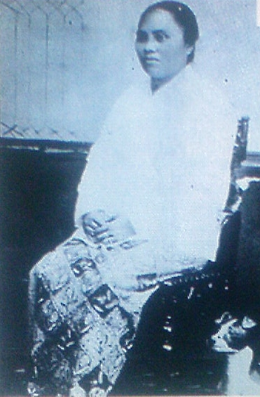 Jawa: Pahlawan saking miinahasa